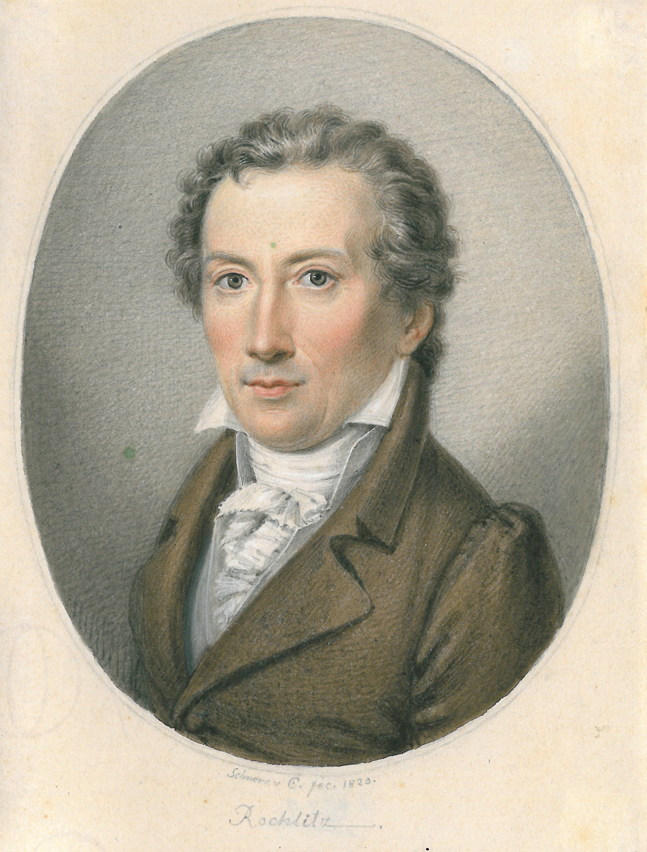 Friedrich Rochlitz, Aquarell von Veit Hanns Schnorr von Carlosfeld